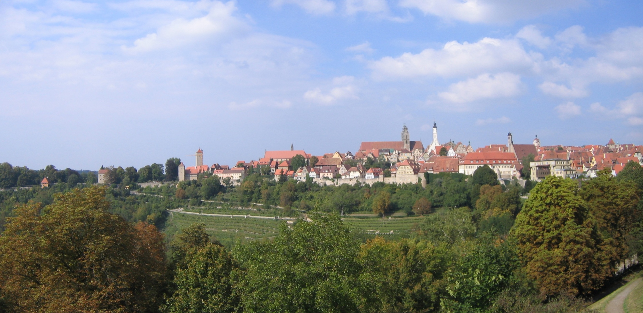 Panoramaaufnahme von Rothenburg ob der Tauber This panoramic image was created with Autostitch. Stitched images may differ from reality.